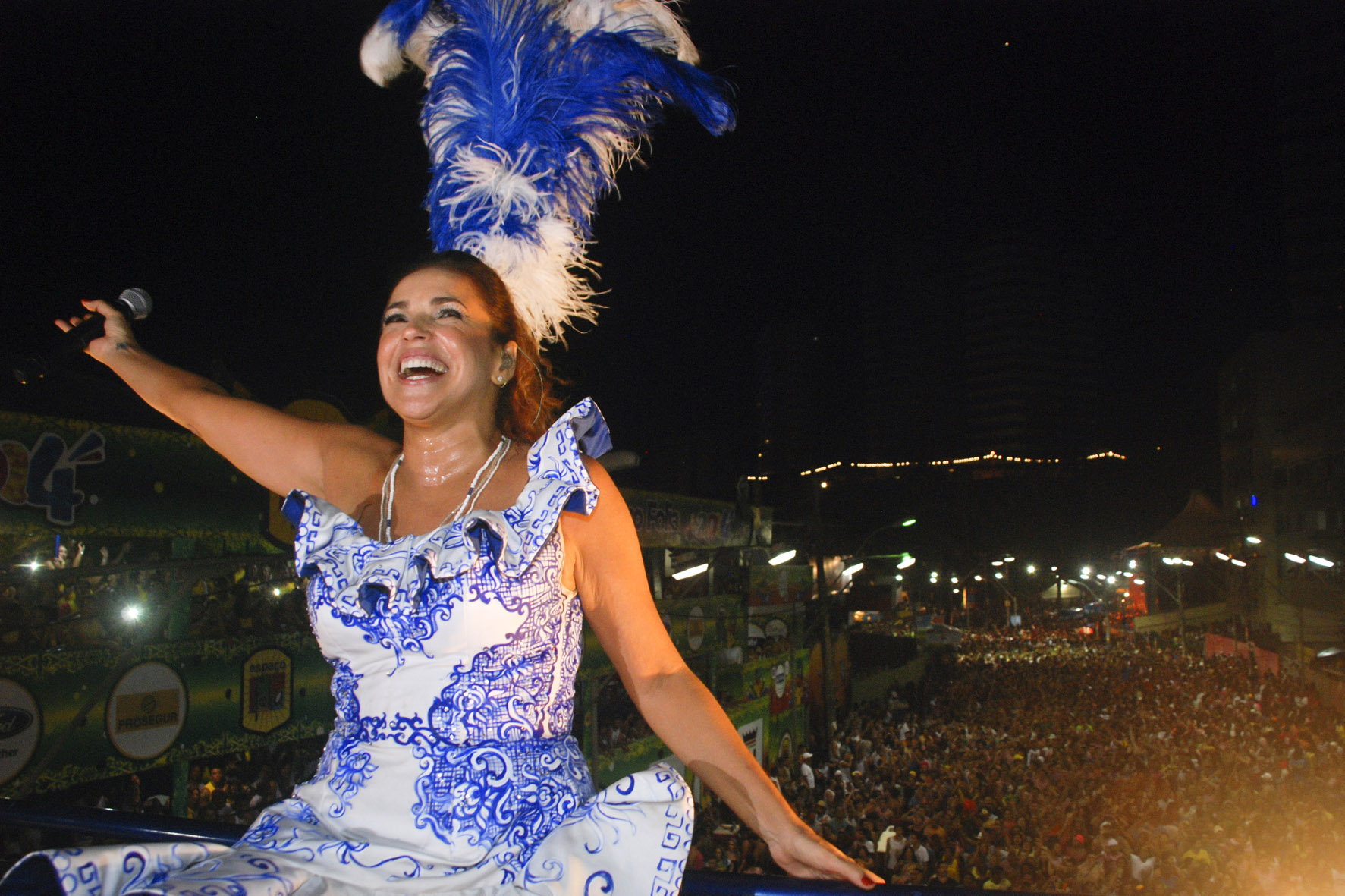 02 - 2014_02_28 Sex - Carnaval SSA - Circuito Dodô - Trio Daniela Mercury - Foto João Ramos - Bahiatursa